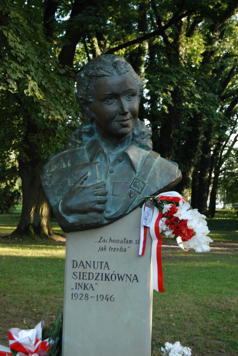 Pomnik Danuty Siedzikówny "Inki" w Parku Jordana w Krakowie